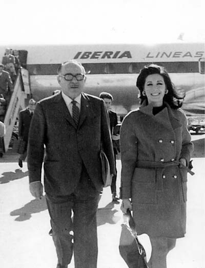 Concha Velasco a su llegada al aeropuerto de Sevilla.